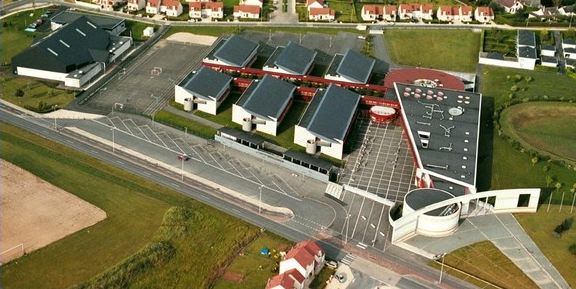 Le lycée Francois Villon de Beaugency